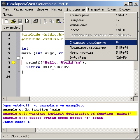 SciTE © 2006 Дан Столяров